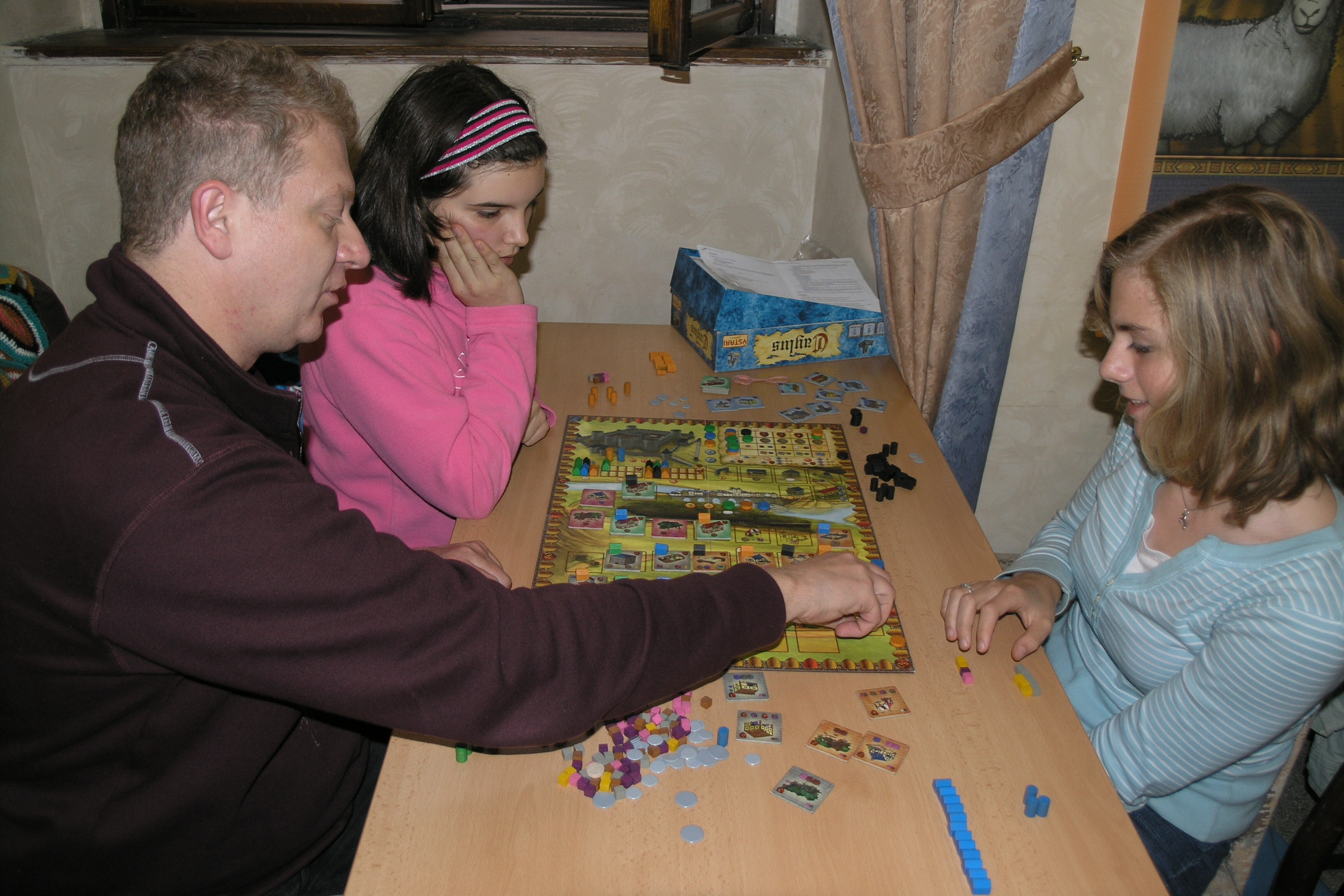 Herní festival Deskohraní 2008 - Caylus